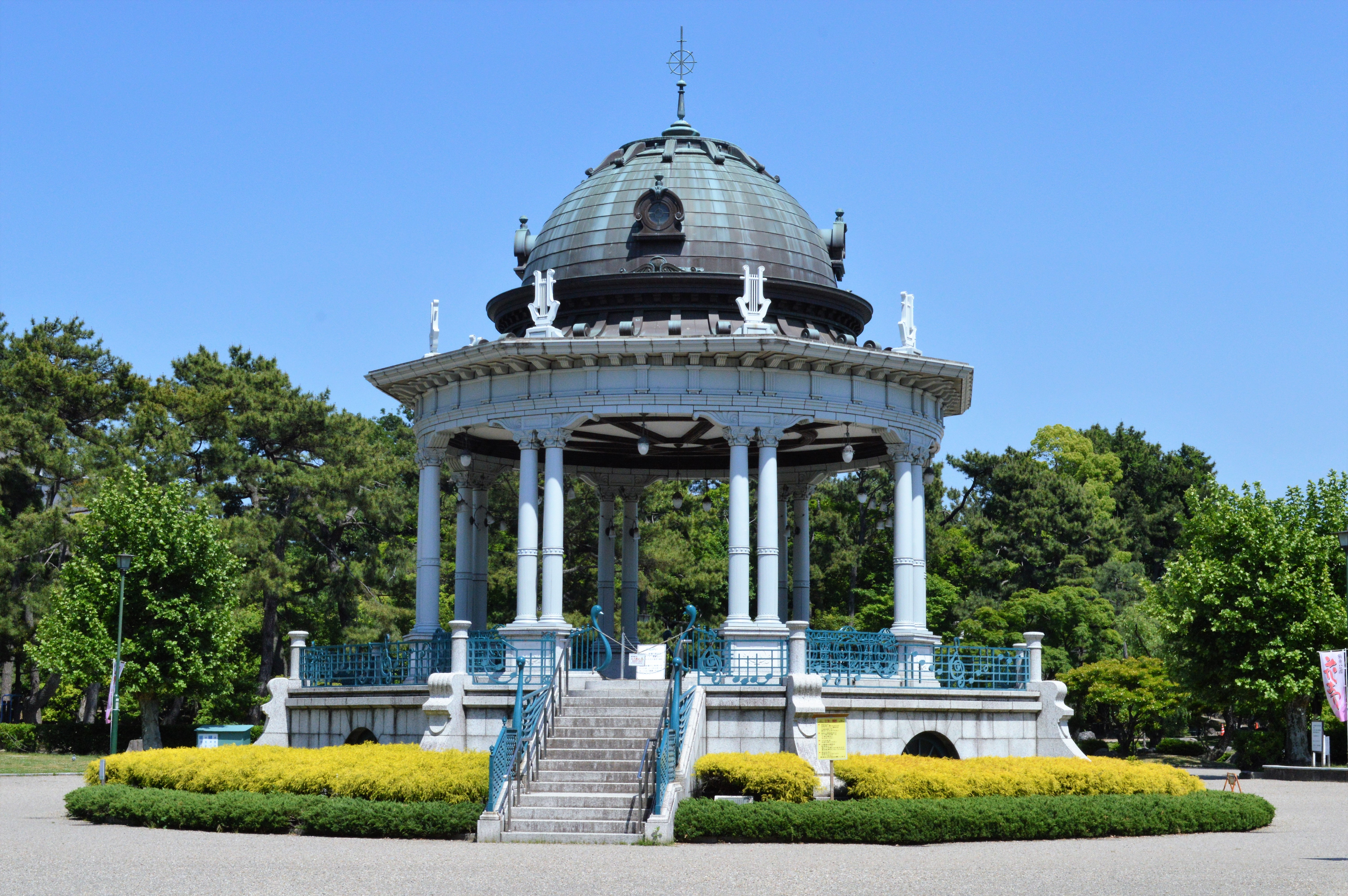 名古屋市の鶴舞公園にある奏楽堂。